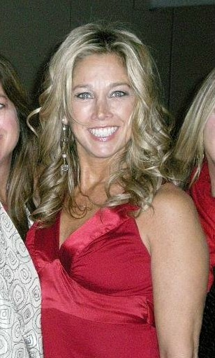 Denise Austin